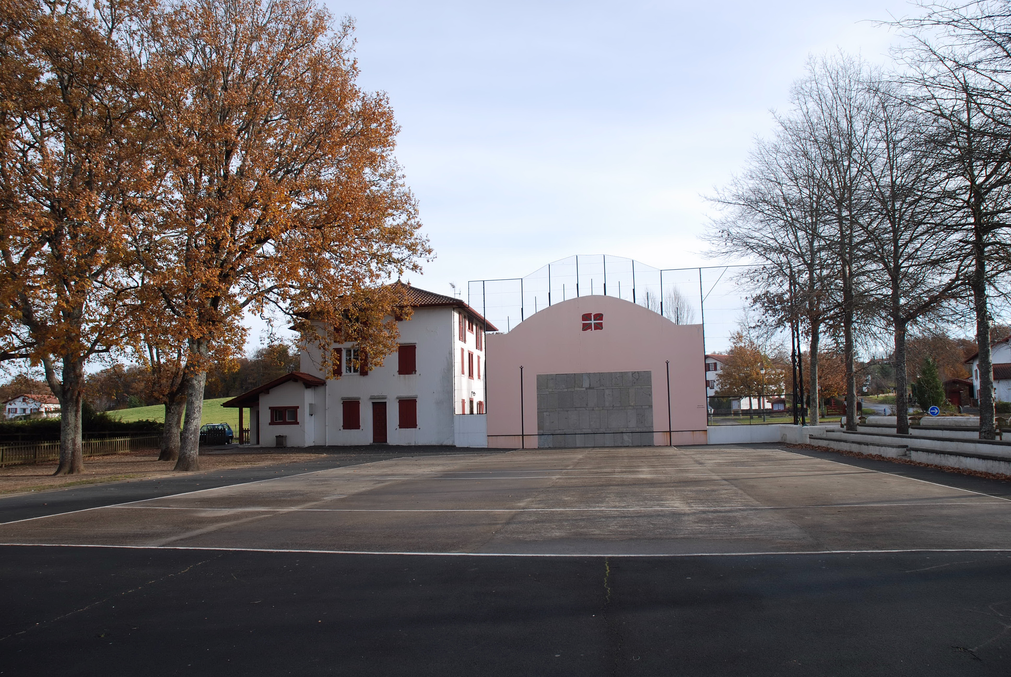 Jatxou, le fronton place libre. Photo prise le 31/12/06 par Harrieta171